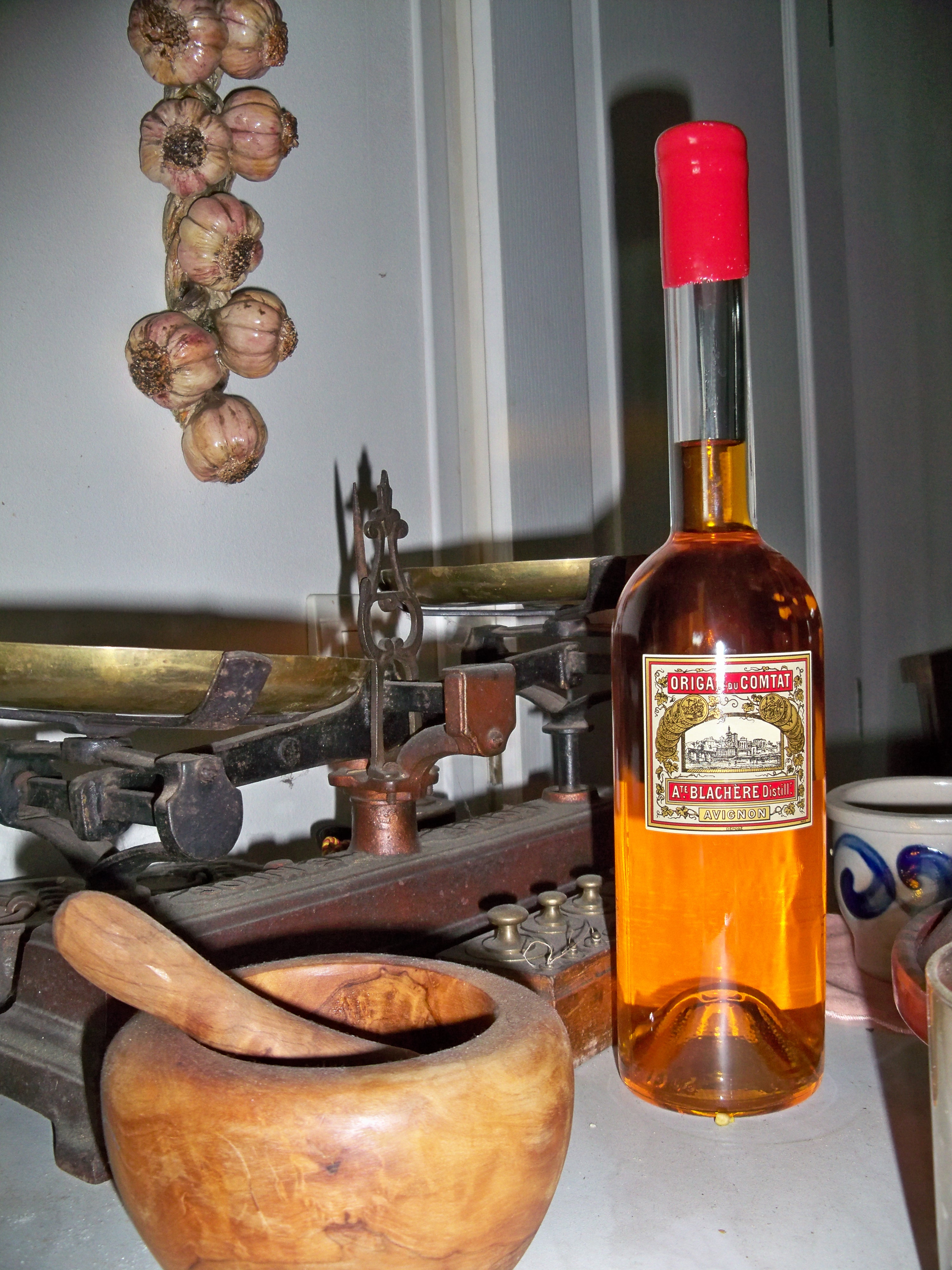 Origan du Comtat, liqueur du Vaucluse (84)